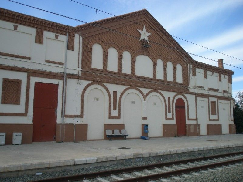 Estación de Zuera. Edificio de viajeros cerrado al público desde 2013. La foto está hecha después de retirar la enorme marquesina de la fachada y tapiar los accesos. Actualmente los trenes de Alta Velocidad pasan por esta vía.